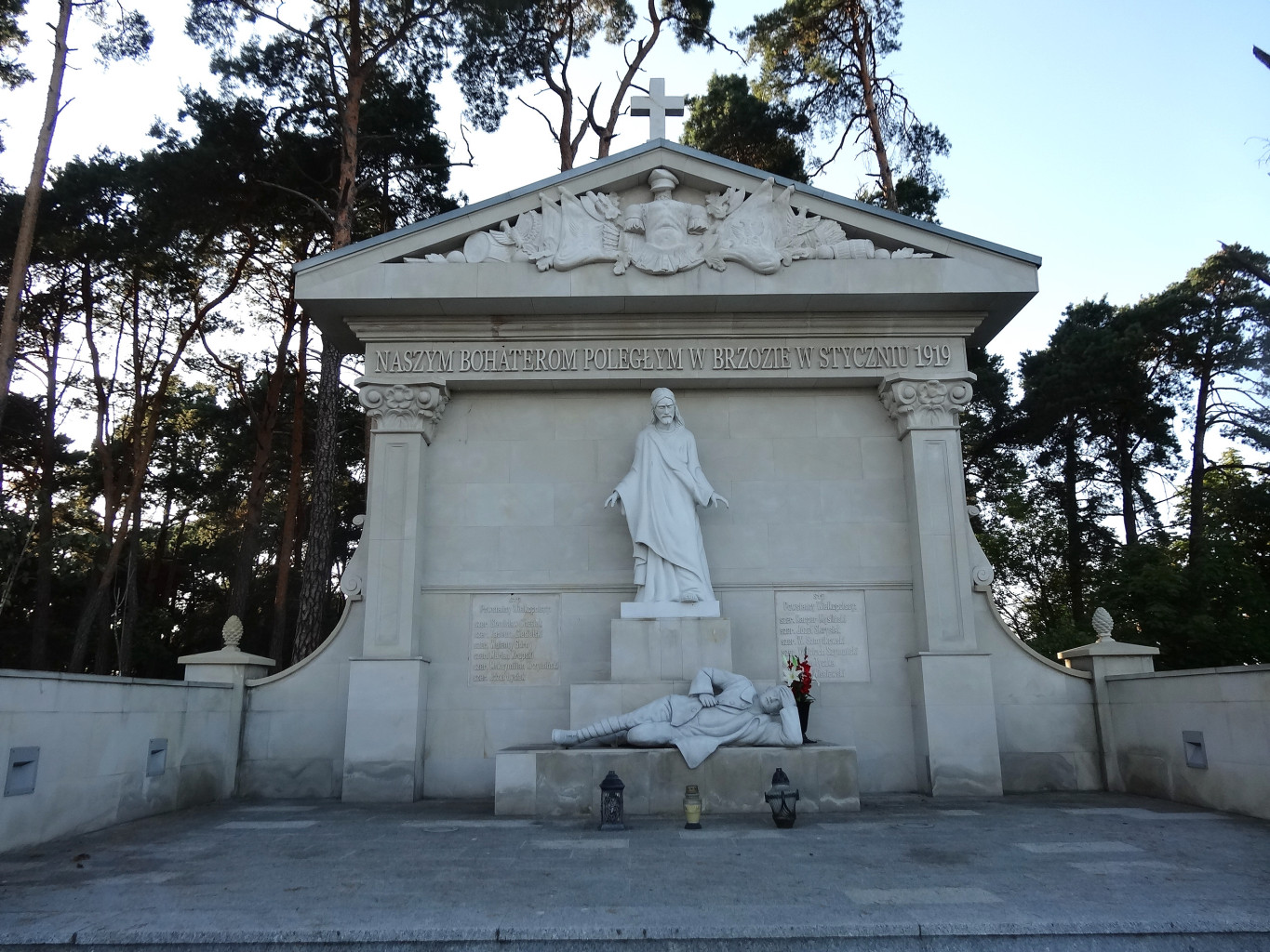 Pomnik poległych powstańców wielkopolskich w Brzozie k. Bydgoszczy, gmina Nowa Wieś Wielka, powiat bydgoski